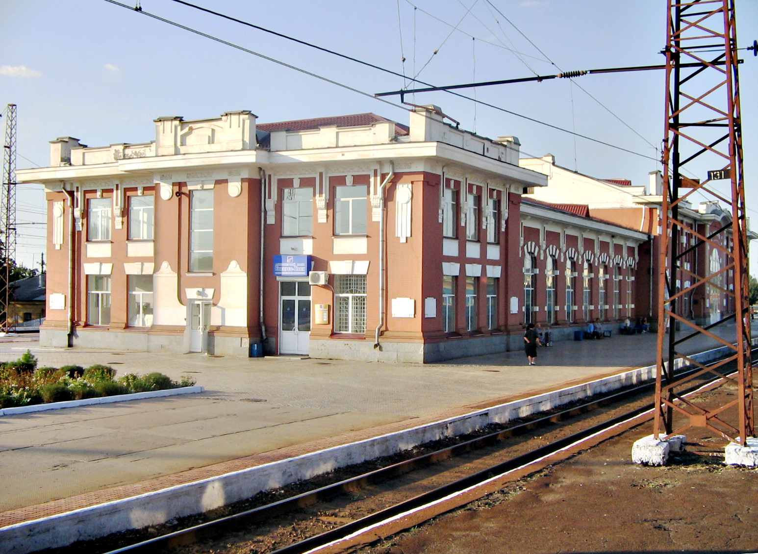 Синельникове Synelnykove Синельниково Низкие платформы станции Синельниково-1